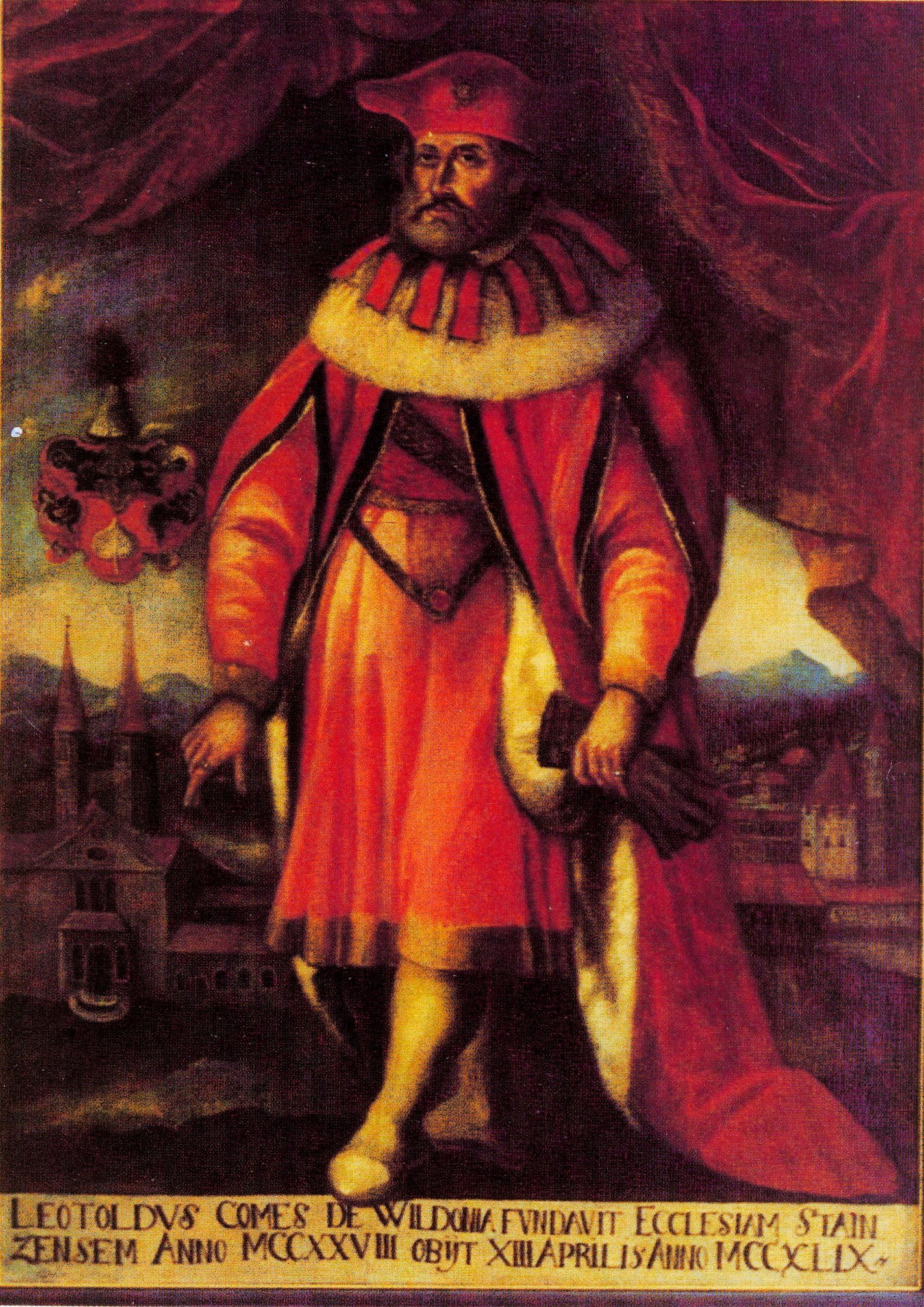 Portrait des Leutold I von Wildon. Schloss Stainz.